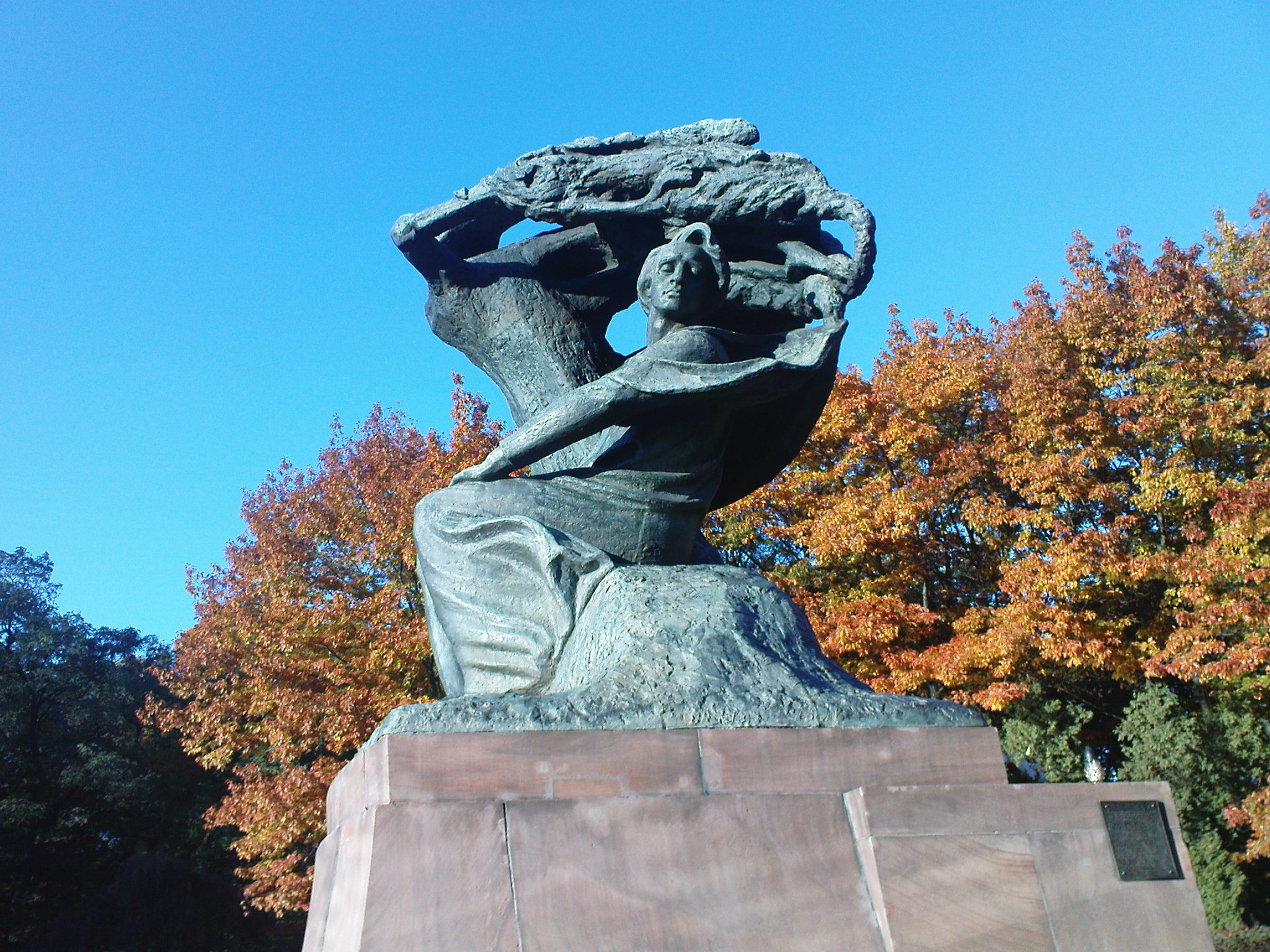 Pomnik Chopina w Łazienkach Królewskich w Warszawie, ale także letni salon muzyczny stolicy. To właśnie tutaj odbywają się liczne plenerowe koncerty gromadzące setki warszawiaków i turystów przebywających w mieście.